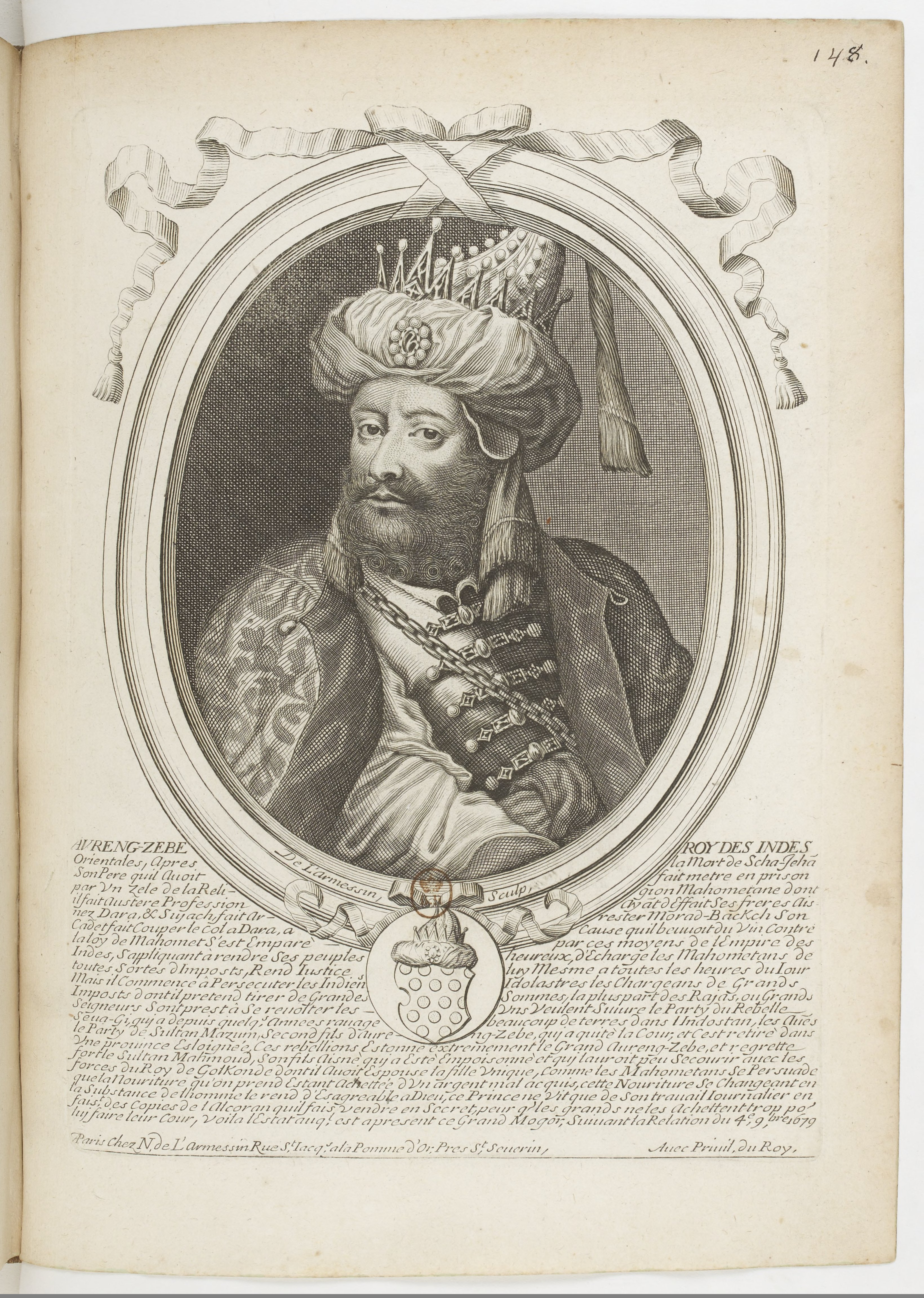 Les augustes représentations de tous les rois de France, depuis Pharamond jusqu'à Louis XIV,... avec un abrégé historique sous chacun, contenant leurs naissances, inclinations et actions plus remarquables pendant leurs règnes